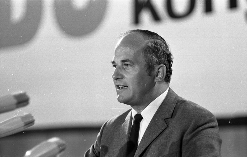 Bundeskanzler Kiesinger spricht vor dem CDU Wahlkongress in Essen im städtischen Saalbau